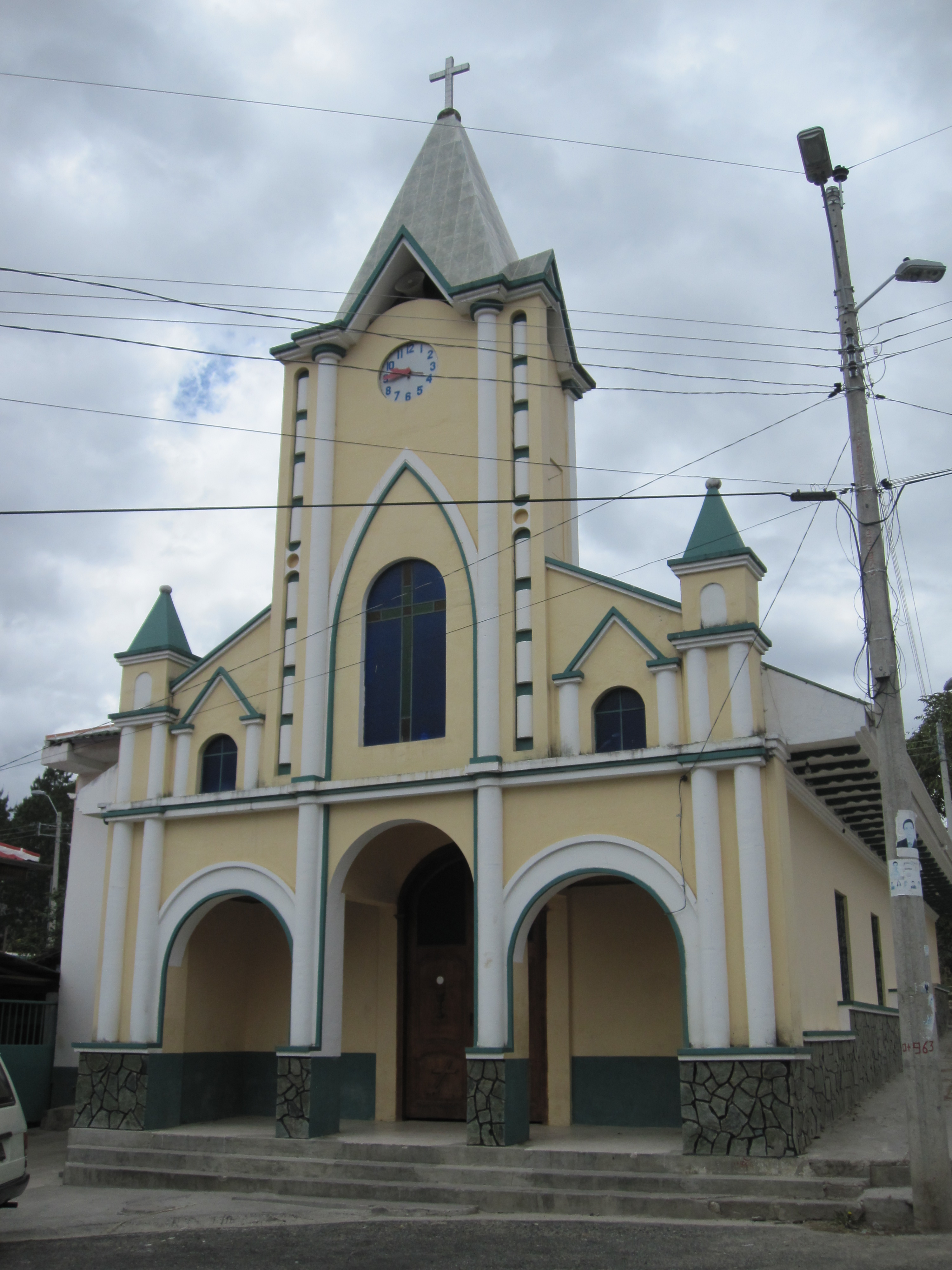 Church in Chorro del Carmen, Azuay, Ecuador